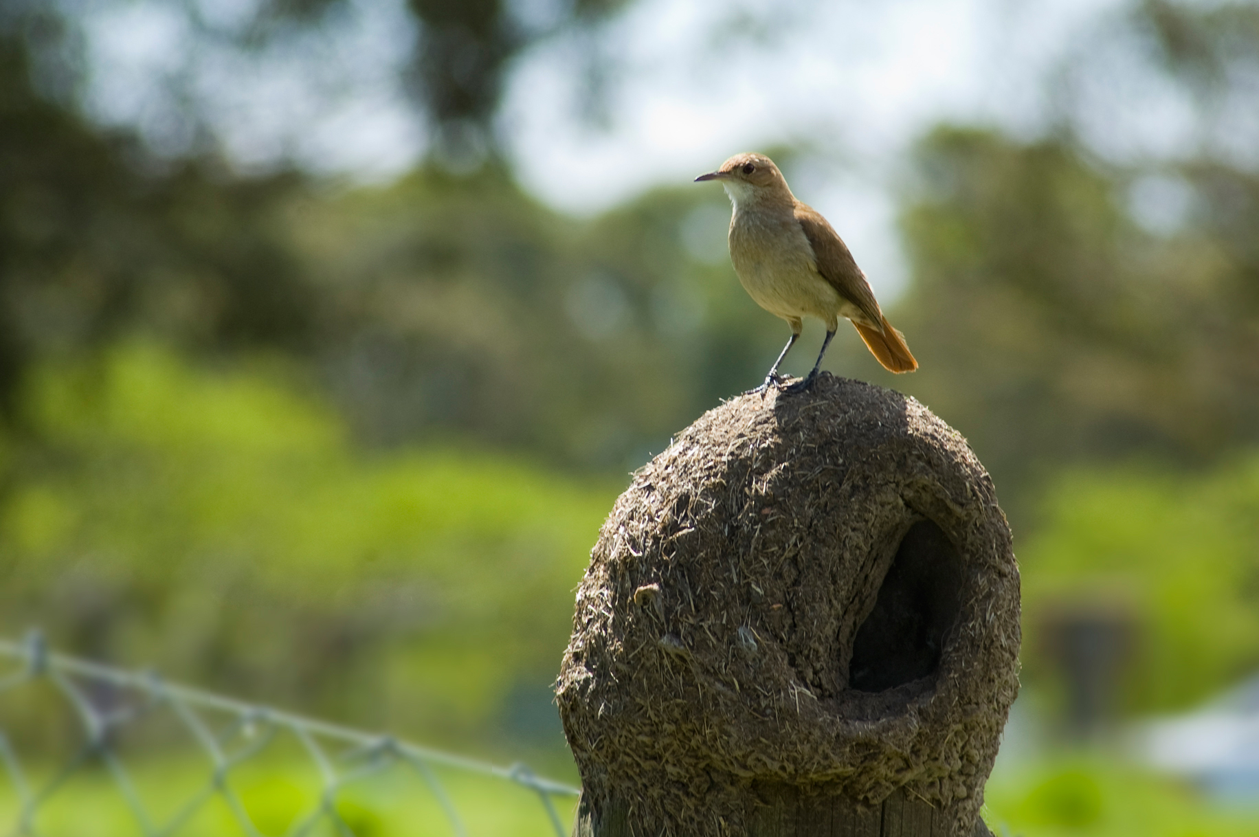 Nido de Hornero Común con un hornero encima. Tomado en el Parque Lecocq ( Montevideo - Uruguay )